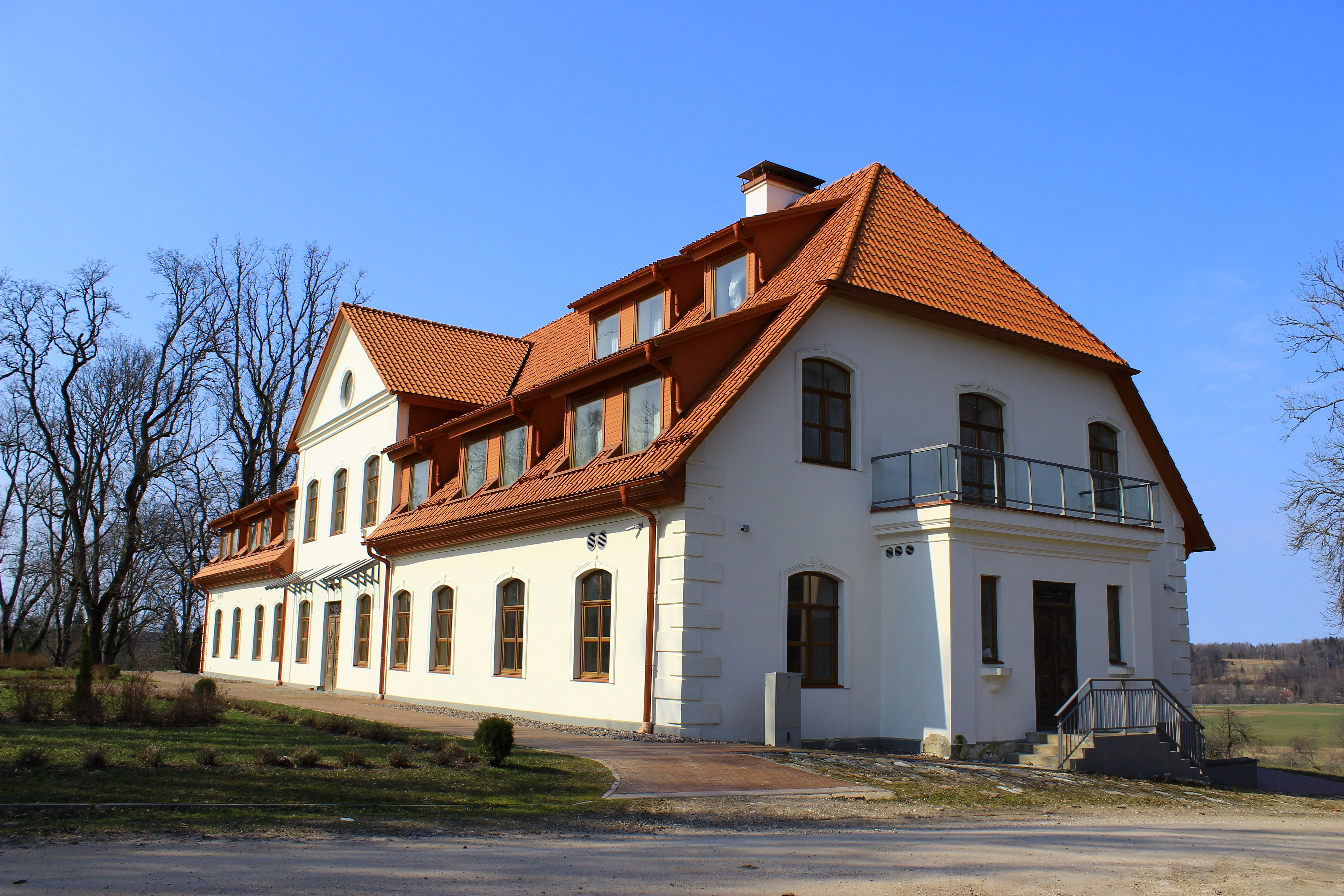 Kalnmuiža Kandavas novadā